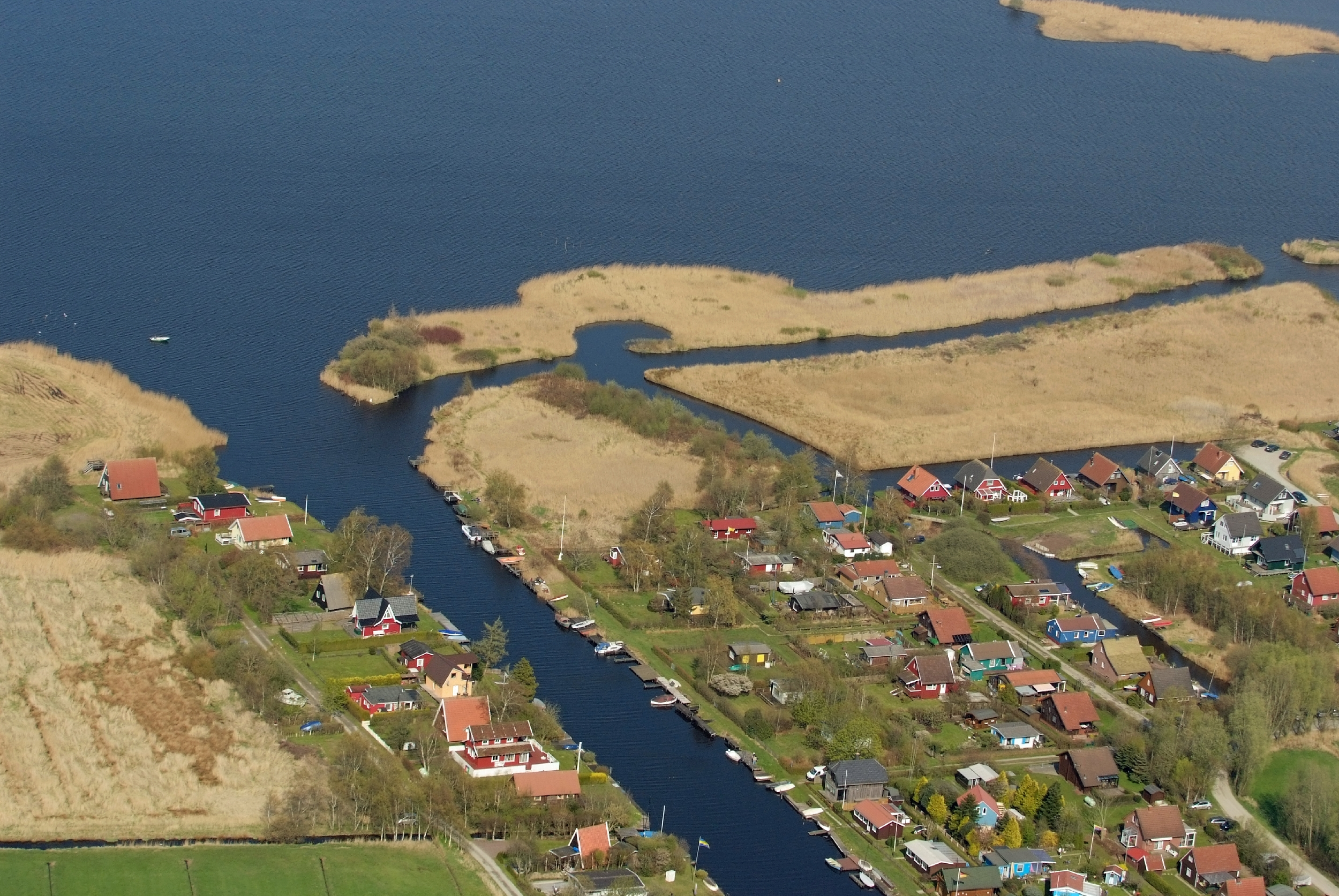 Wochenendhäuser in Emden-Marienwehr (rechts des Kanals) und in der Gemeinde Hinte (links des Kanals). Der Kanal namens Kurzes Tief führt zum Kleinen Meer (Hintergrund)